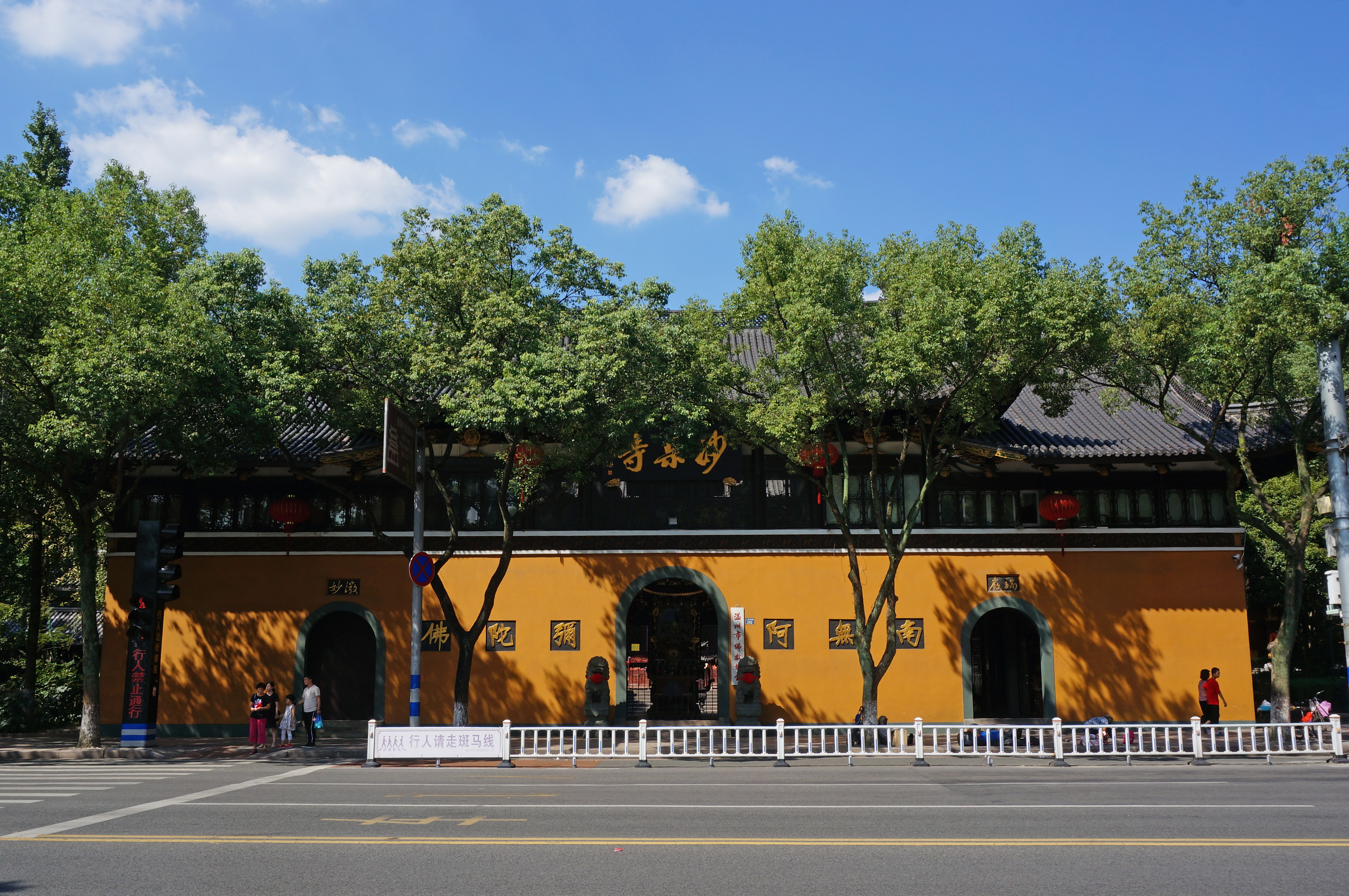 温州妙果寺，山门南面。